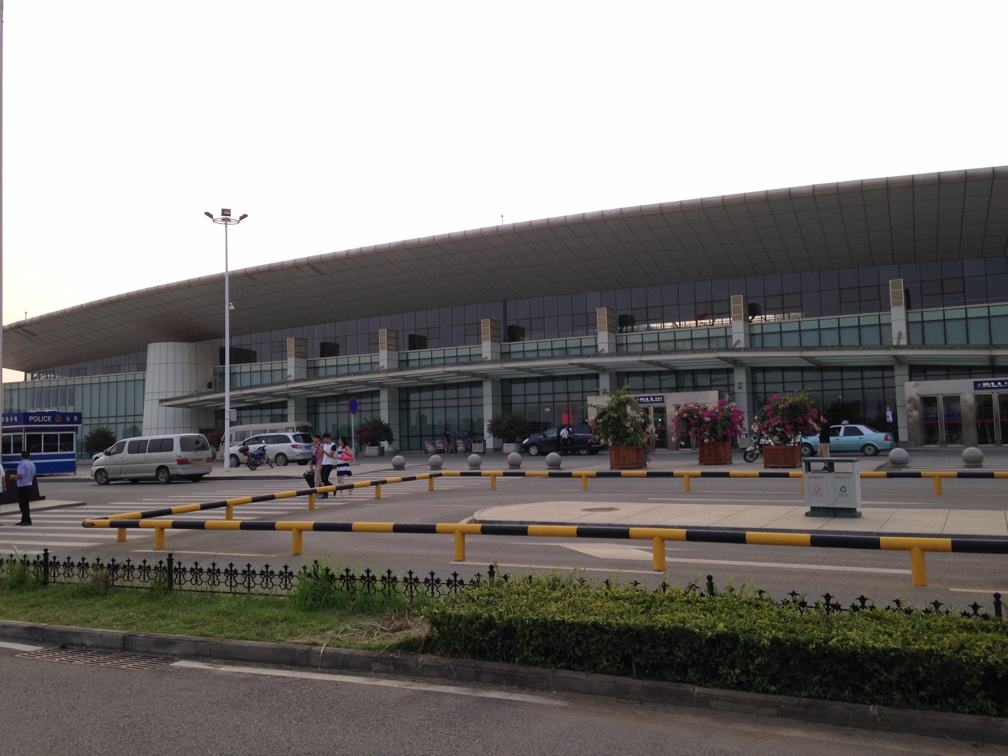 武漢天河国際空港・国際ターミナル